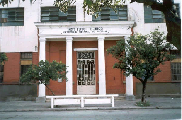 Fachada Instituto Técnico UNT